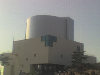 Girawali Observatory